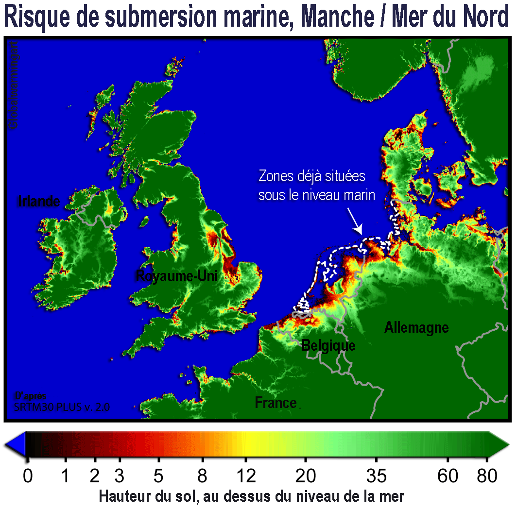 Carte mettant en exergue (couleurs chaudes) les zones de risque de submersion suite à la probable montée des océans induites par le réchauffement climatique. Permission is granted to copy, distribute and/or modify this image under either: The GNU Free Documentation License Version 1.2; with no Invariant Sections, Front-Cover Texts, or Back-Cover Texts. The Creative Commons Attribution-NonCommercial-ShareAlike License Version 2.5 It is expected that reusers of this image will: Acknowledge Global Warming Art and/or the specific author of this image, as the source of the image. Provide a link or reference back to this specific page: Allow any modifications made to the image to also be reused under the terms of one or both of the licenses noted above.